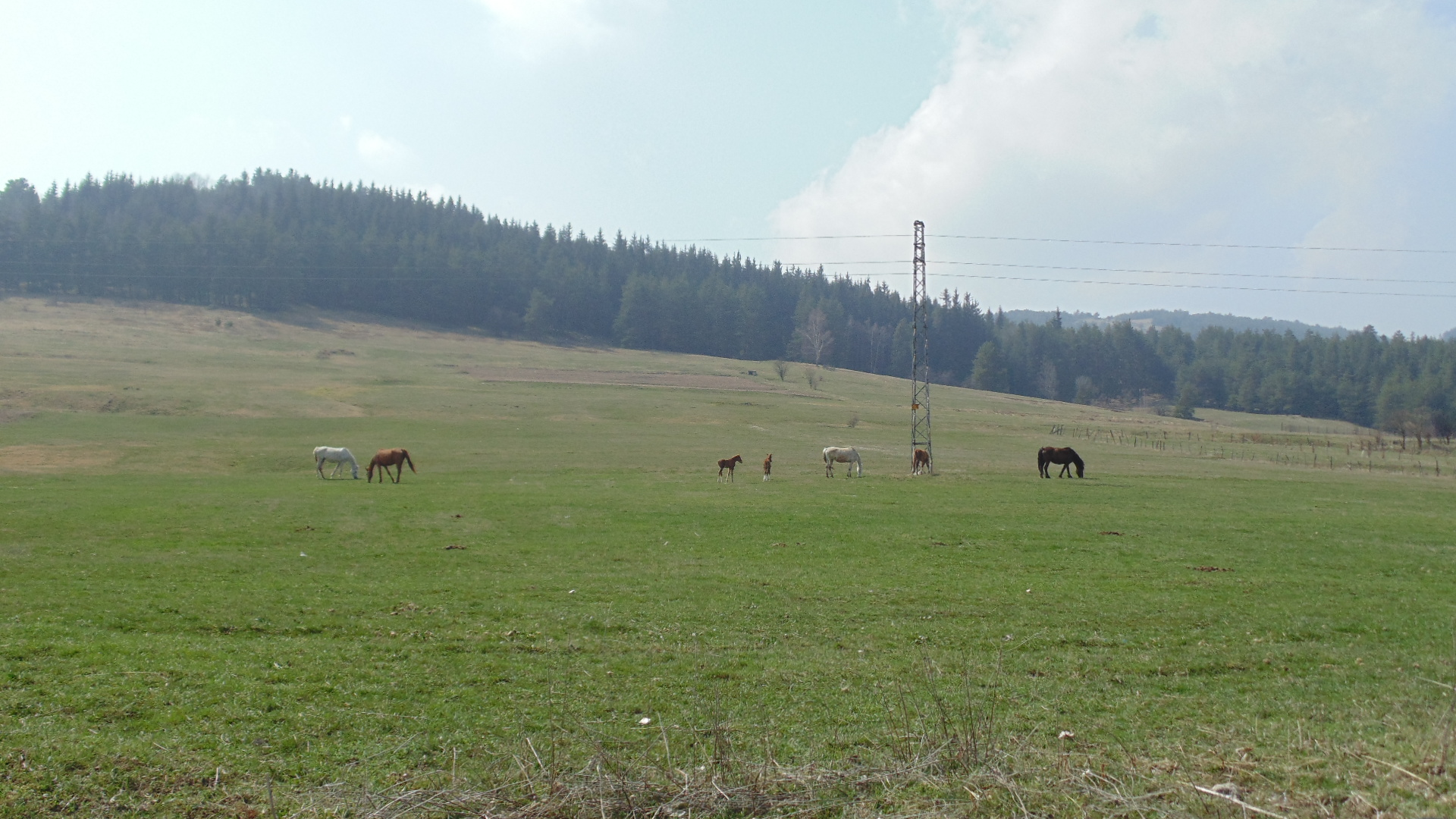 Копривщенска котловина